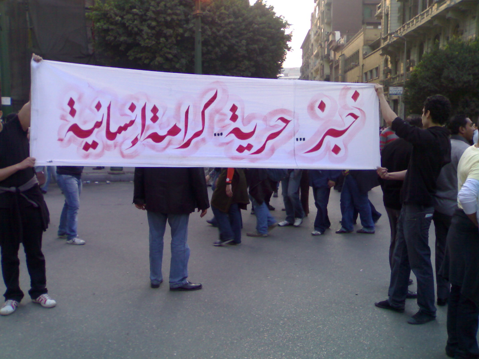 شعار ثورة 25 يناير بمصر: خبز، حرية، كرامة إنسانية. تاريخ الصورة: 1 فبراير 2011، أثناء إحياء ذكرى مرور أسبوع على قيام الثورة. مكان التقاط الصورة: ميدان طلعت حرب القريب من ميدان التحرير بالقاهرة.